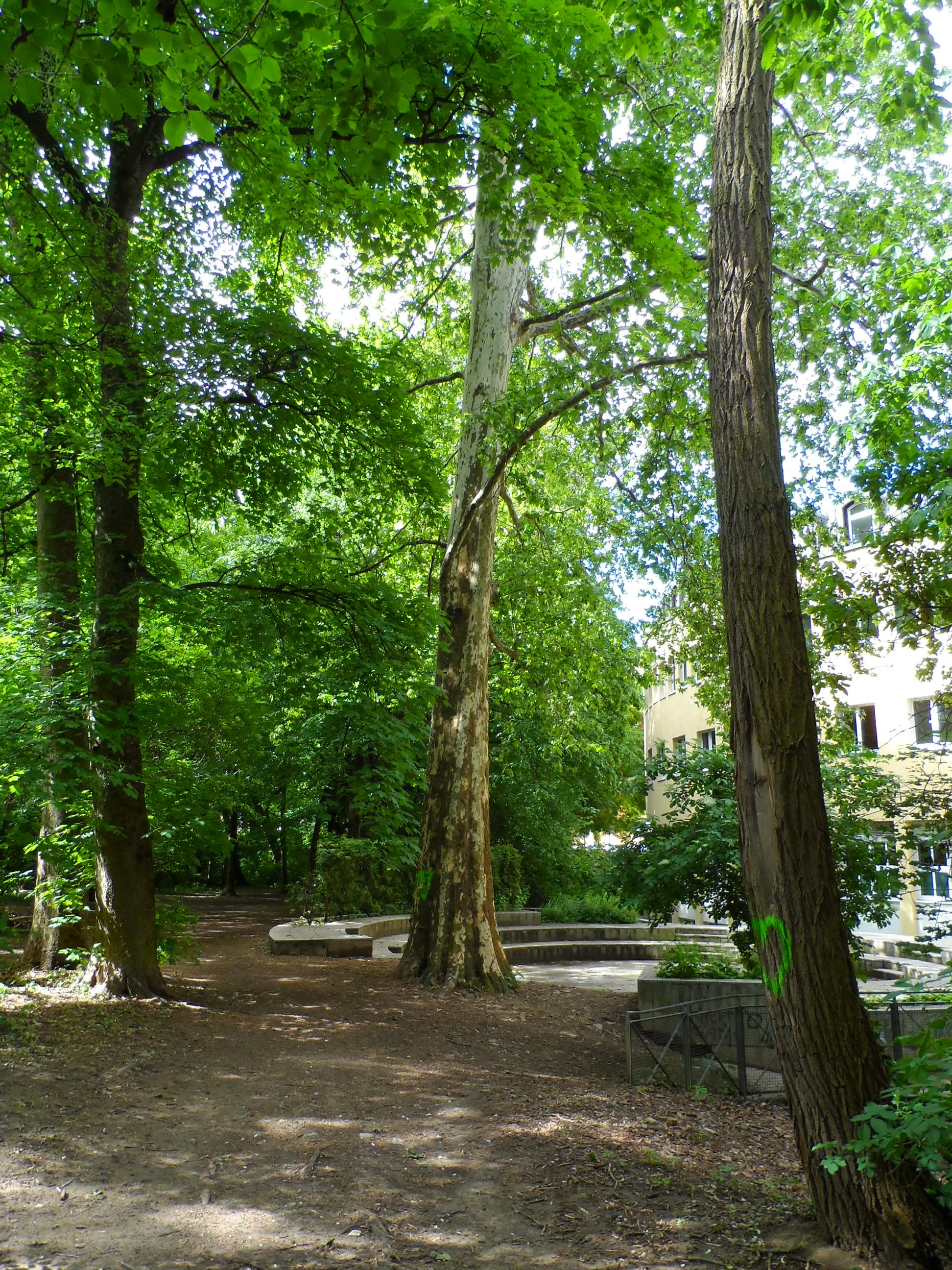 Amphitheater der Kunstuniversität im Meranpark This media shows the Geschützter Landschaftsteil in Styria with the ID GLT_1307.